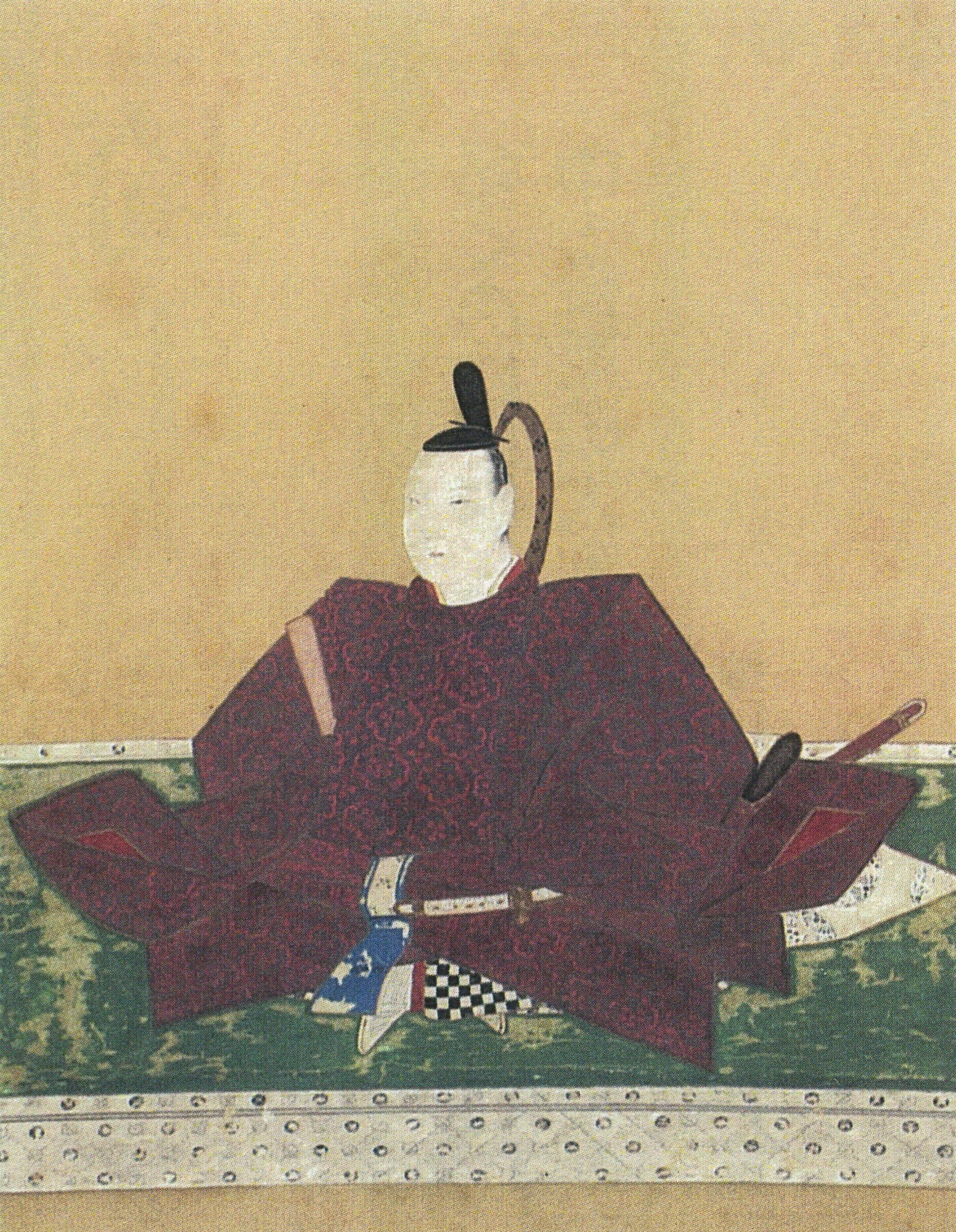 平戸藩主松浦久信の肖像。